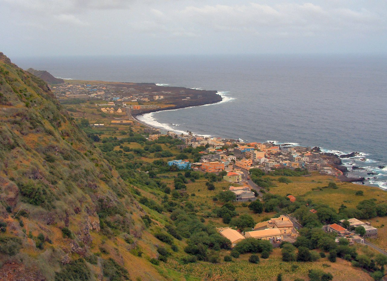 Mosteiros